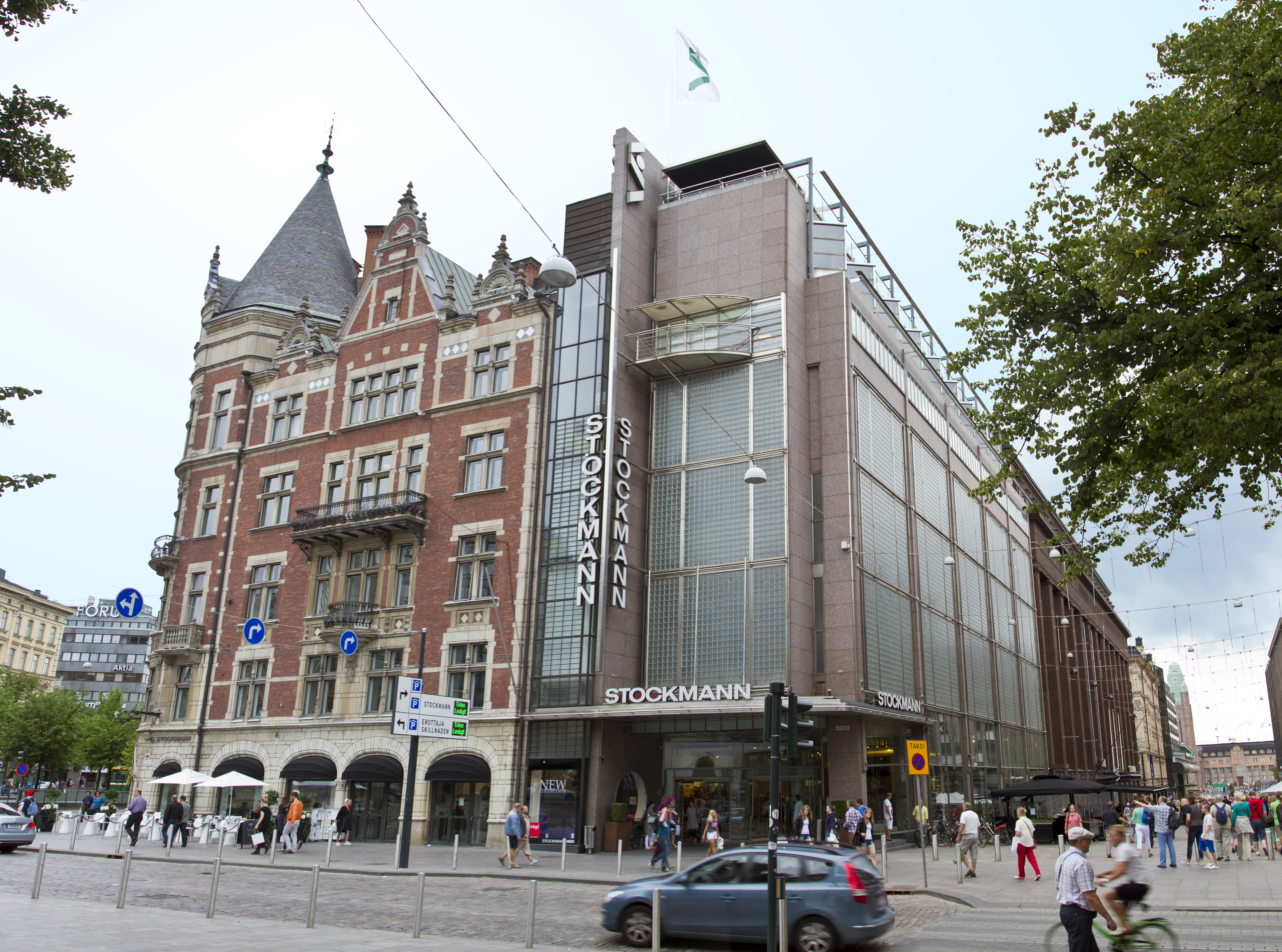 Stockmannin eteläinen osa.